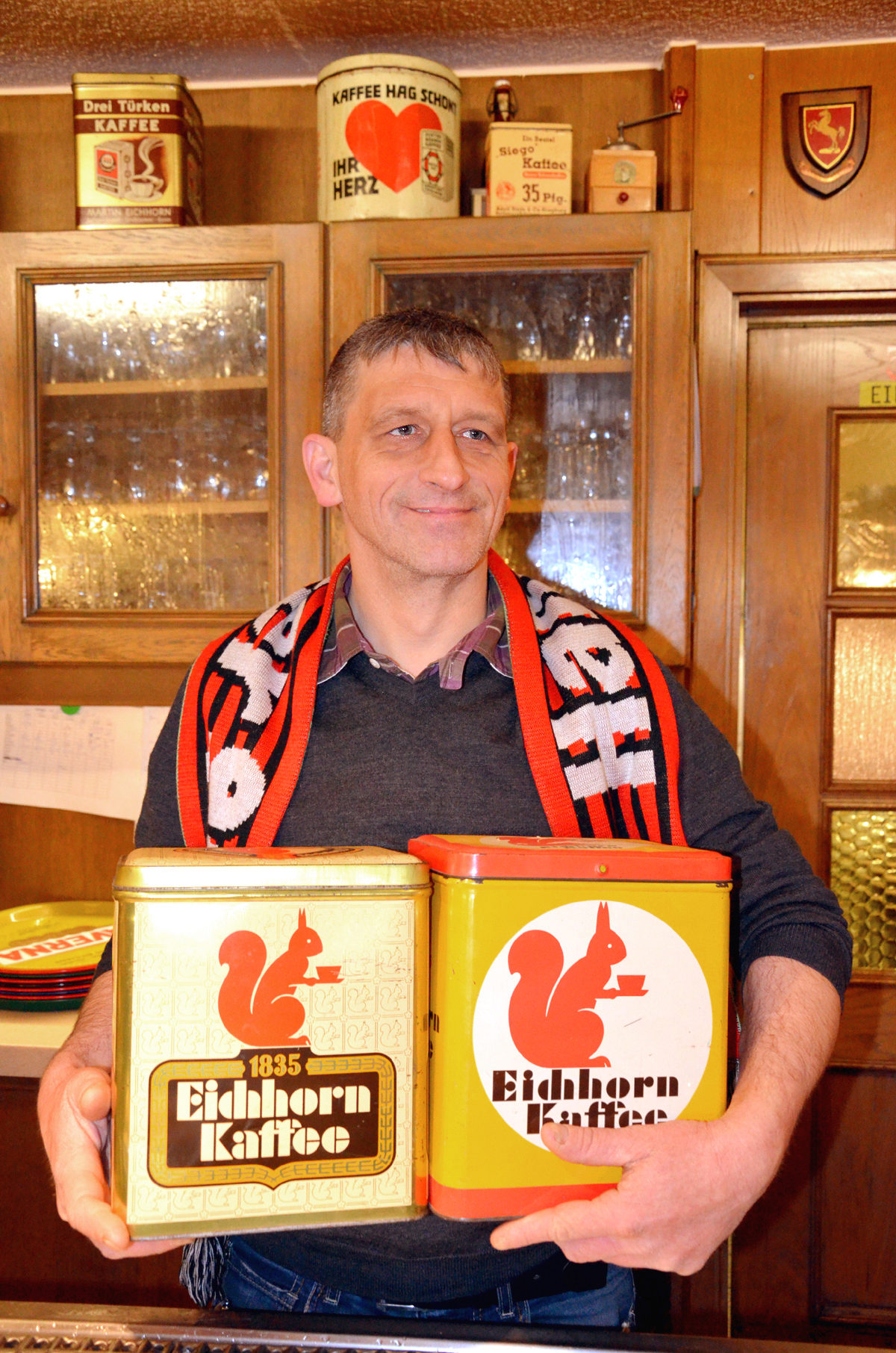 Dirk Runge, Geschäftsführer der Gaststätte mit angeschlossenem Hotel, Kegell- und Schießsportanlage „Zur Eiche“ in Hannover, Groß-Buchholz, dekoriert Schankraum und Tanzsaal mit historischen Blechdosen und anderem Utensilien rund ums Kaffeetrinken. Hier ist er hinter dem Biertresen zu sehen mit zwei großen Dosen der Marke Eichhorn-Kaffee, zwei "Designer-Stücken" aus der Geschichte der 1835 von Wilhelm Eichhorn begründeten Kaffeerösterei ...